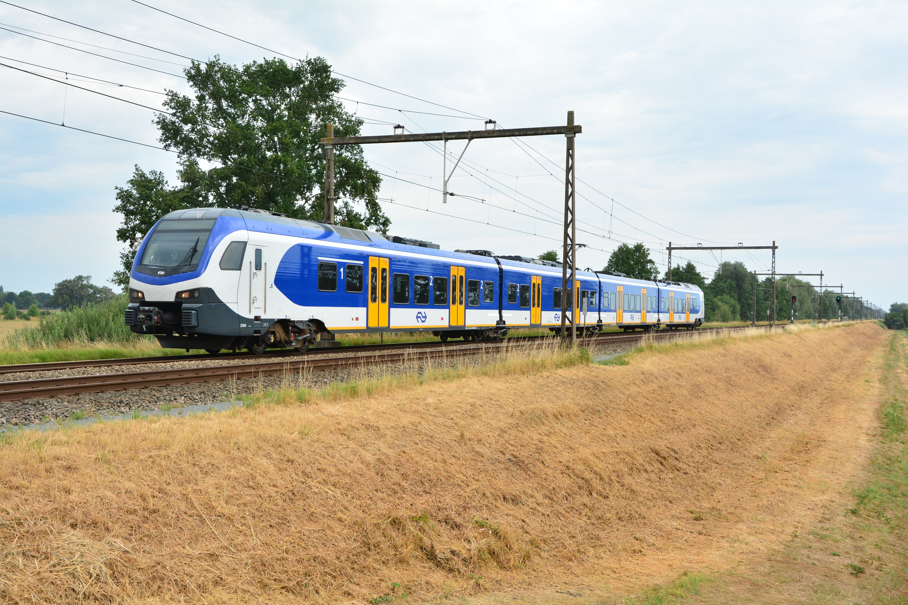 NS 2504 nadert op 27 juli 2018 de Kleine Vosstraat t.h.v. Oeken.